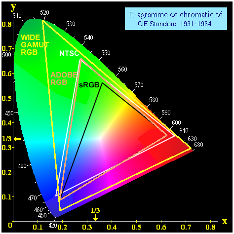 Popularne przestrzenie barwne. Poczynając od najszerszych: Wide gamut rgb, adobe rgb, ntsc i najmniejszy srgb. The picture is modified version (under the licence of creative commons) of: File:Gamut-CIE sRGB NTSC.png